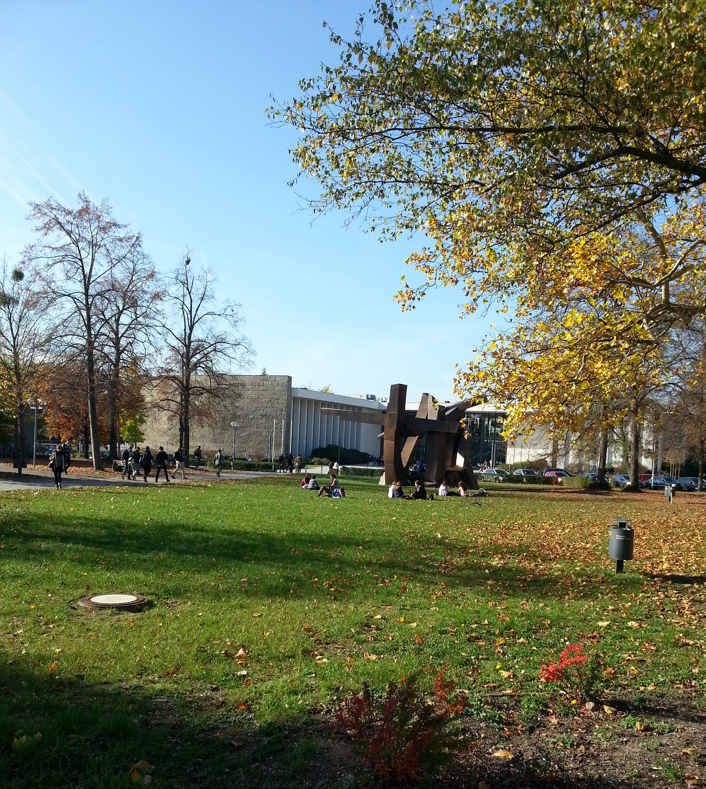 Blick vom Jura-Gebäude der FU Berlin auf das Studenten-Monument und dem Henry-Ford-Bau im Hintergrund.